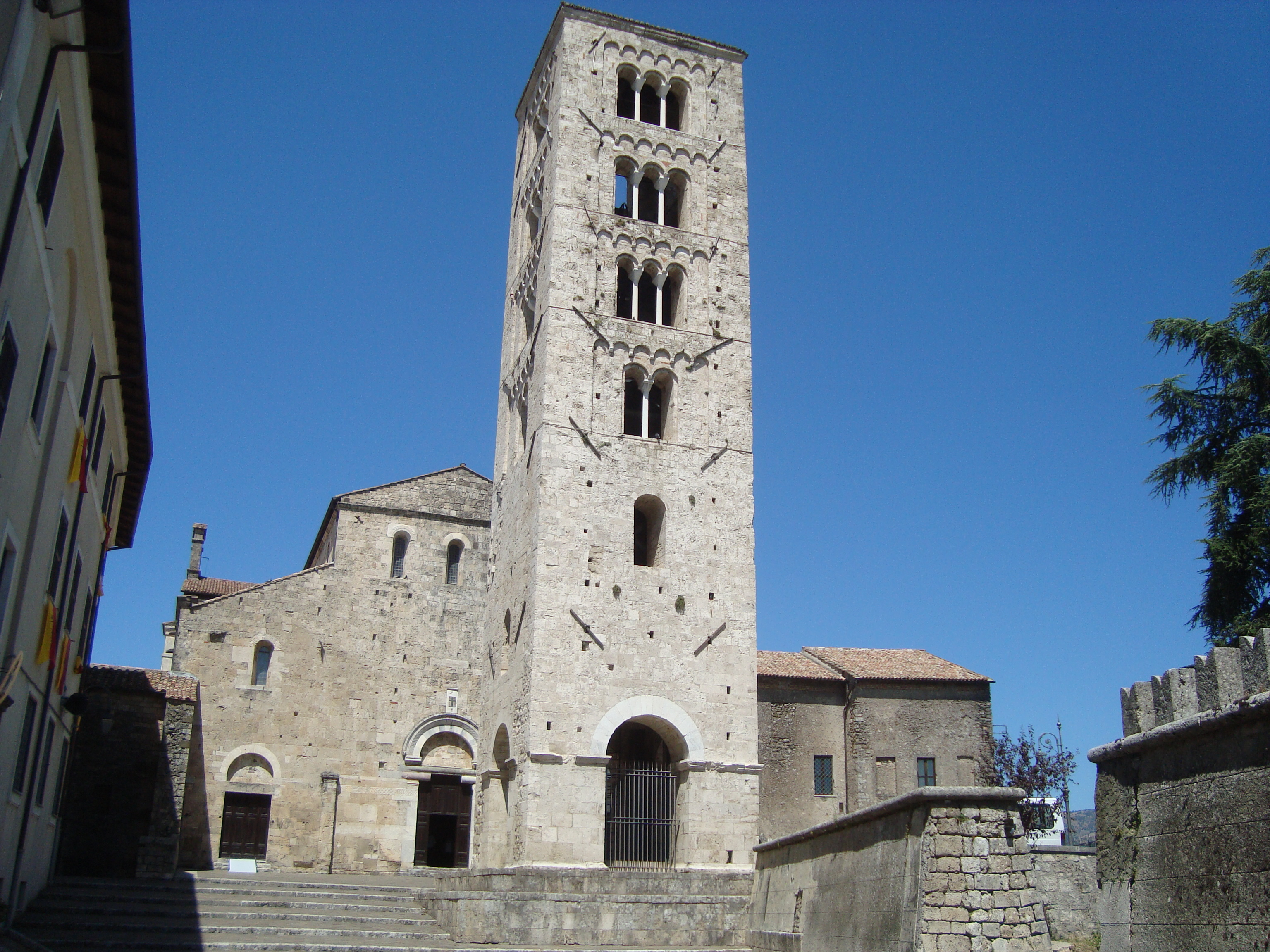 Facade et campanile de la cathédrale Santa Maria in Anagni